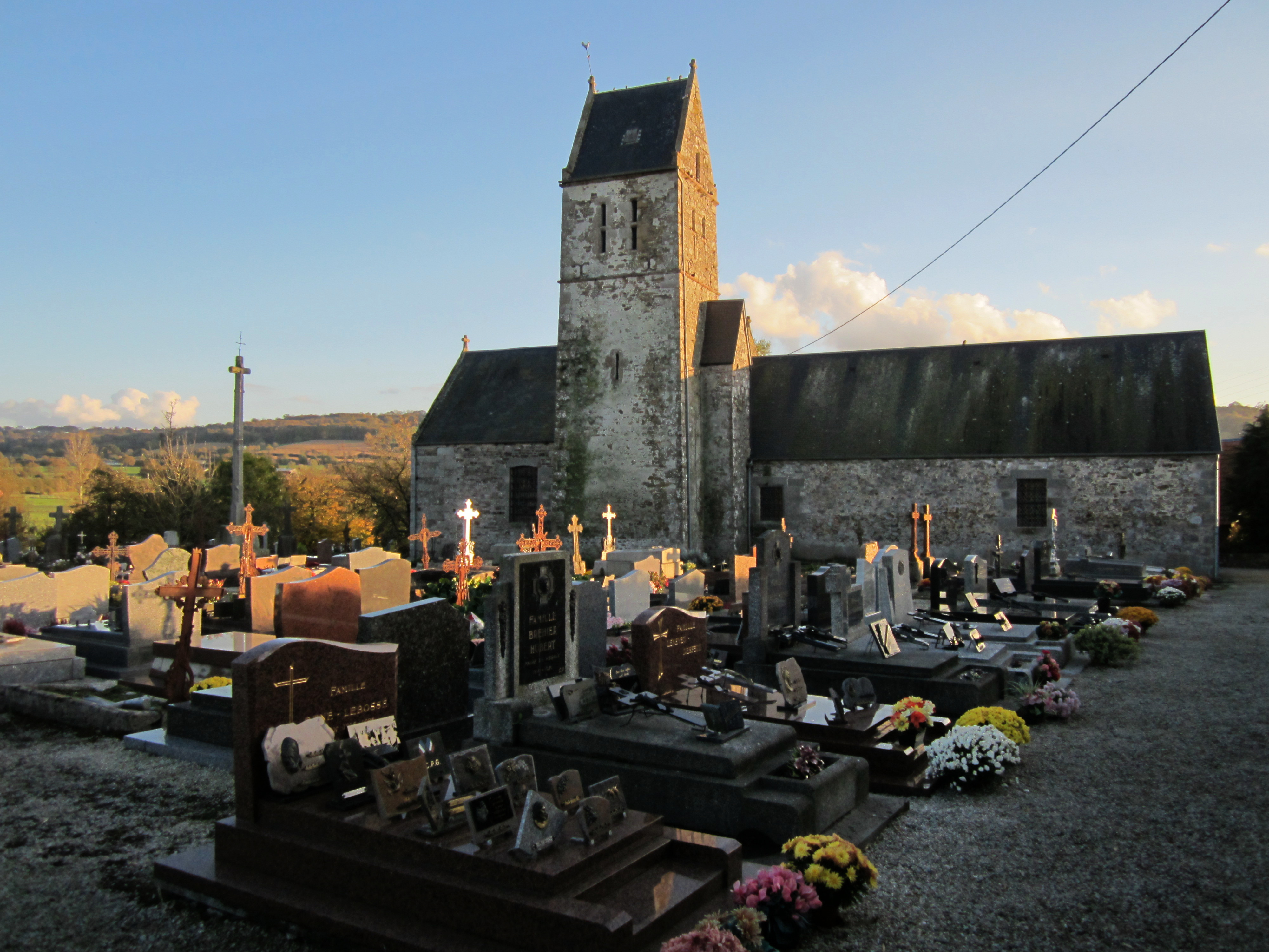 Vernix, Manche